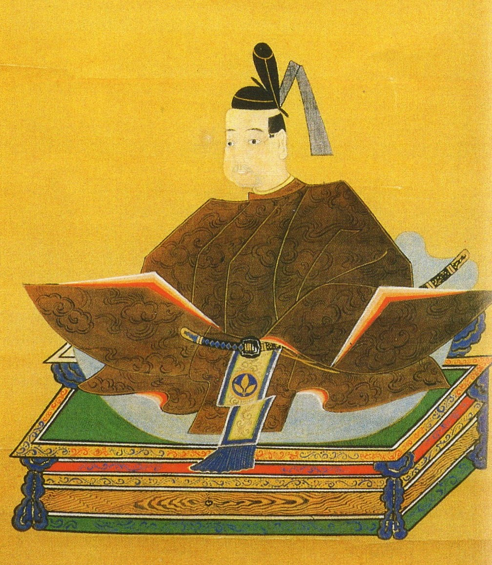 松平乗紀の肖像(モノクロ)。